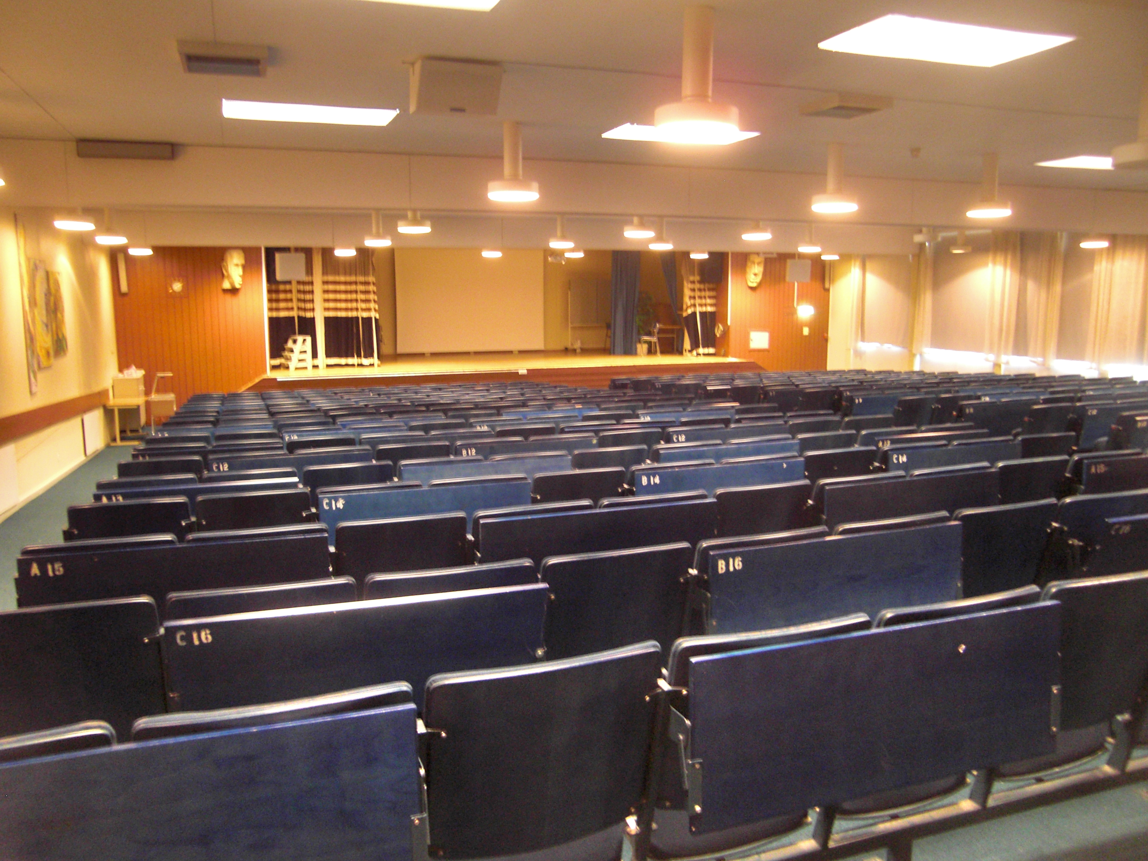 Aulan i gamla A-huset på Ållebergsgymnasiet, Falköping, Falköpings kommun, f.d. Skaraborgs län, Västergötland, Västra Götalands län, Sverige. A-huset byggdes 1974 och revs 2013. Fotot är taget i samband med Falbygdens museums byggnadsdokumentation i 25 januari 2010.